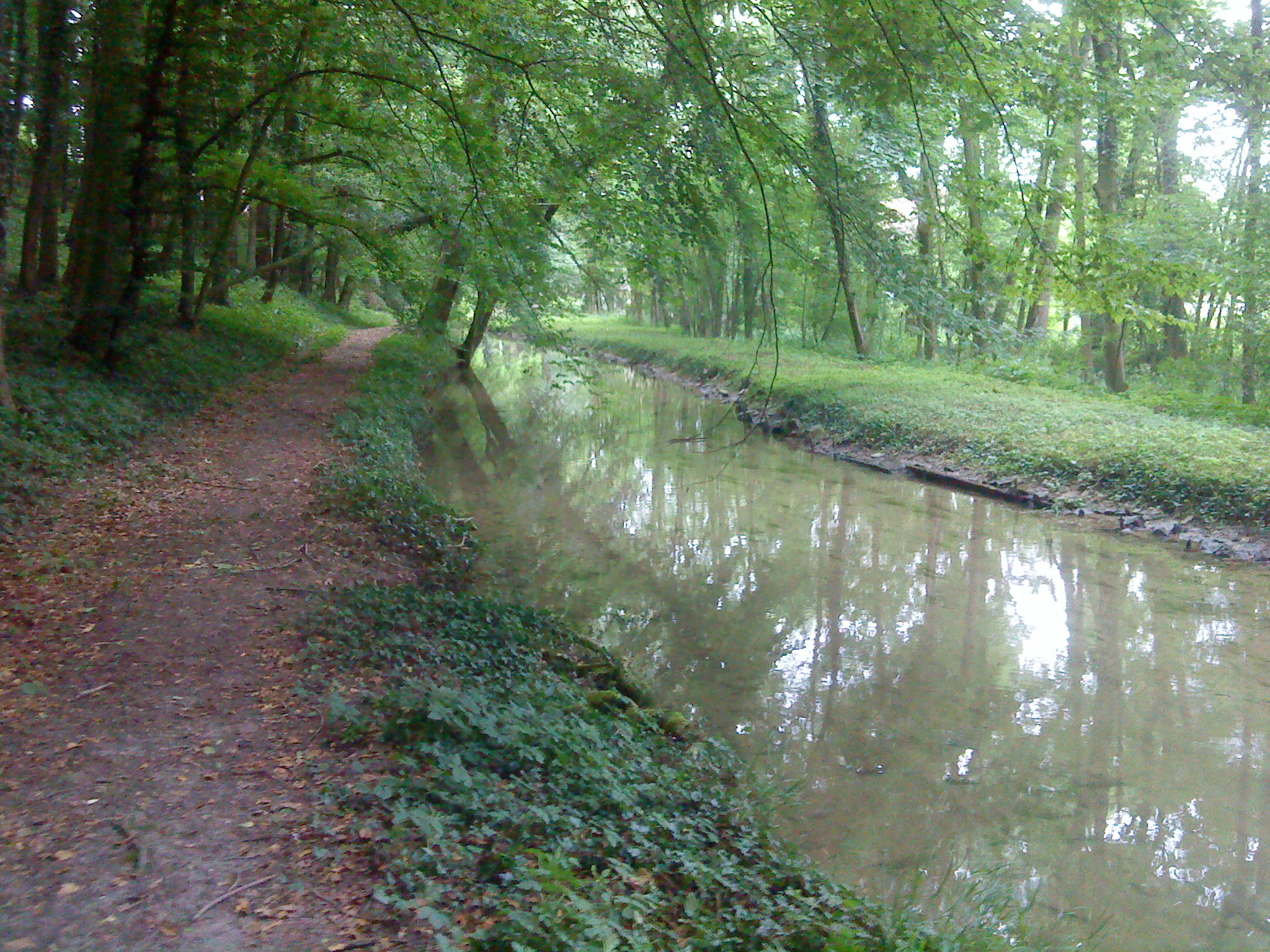 Der Abfließende Bach Biske aus dem Storchenkolk